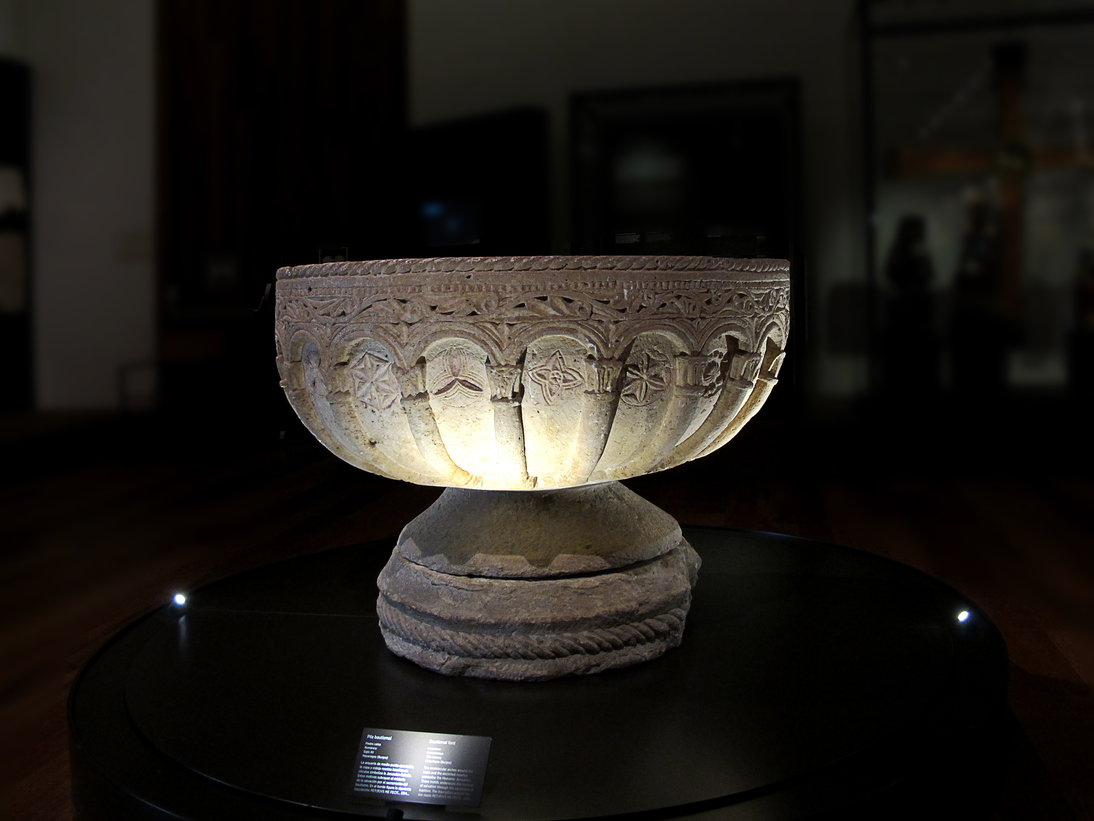 ================================ Pila compuesta de basa circular y amplia copa semiesférica. Esta está decorada con una arquería de medio punto cobijando rosetas inscritas en cículos, todo lo cual se completa con sogueados, semicírculos tangentes y roleos. Está firmada. En el borde de la copa: ERA M C PET[R]US ME FECIT una representación celeste Museo Arqueológico Nacional - Madrid